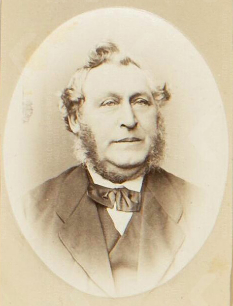 Bron: "De burgemeesters in de Provincie Gelderland", aan den Heer L.G.A. graaf van Limburg Stirum, staatsraad, Commissaris des Konings in dat gewest 1853-1878, het boek bevindt zich in de collectie RKD – Nederlands Instituut voor Kunstgeschiedenis (Collectie Iconografisch Bureau), Den Haag